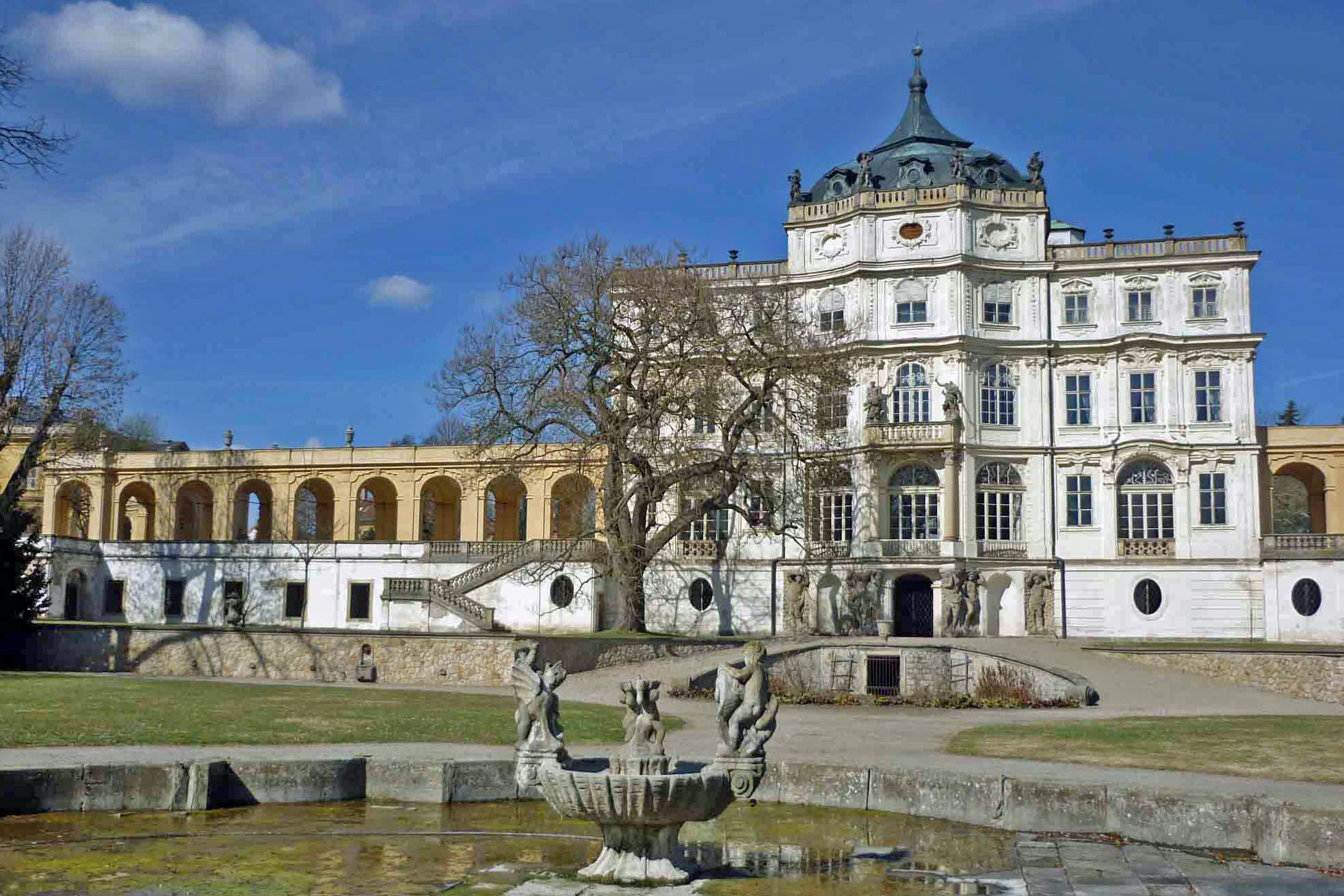 Schloss Ploskowitz (Ploskovice) in Nordböhmen